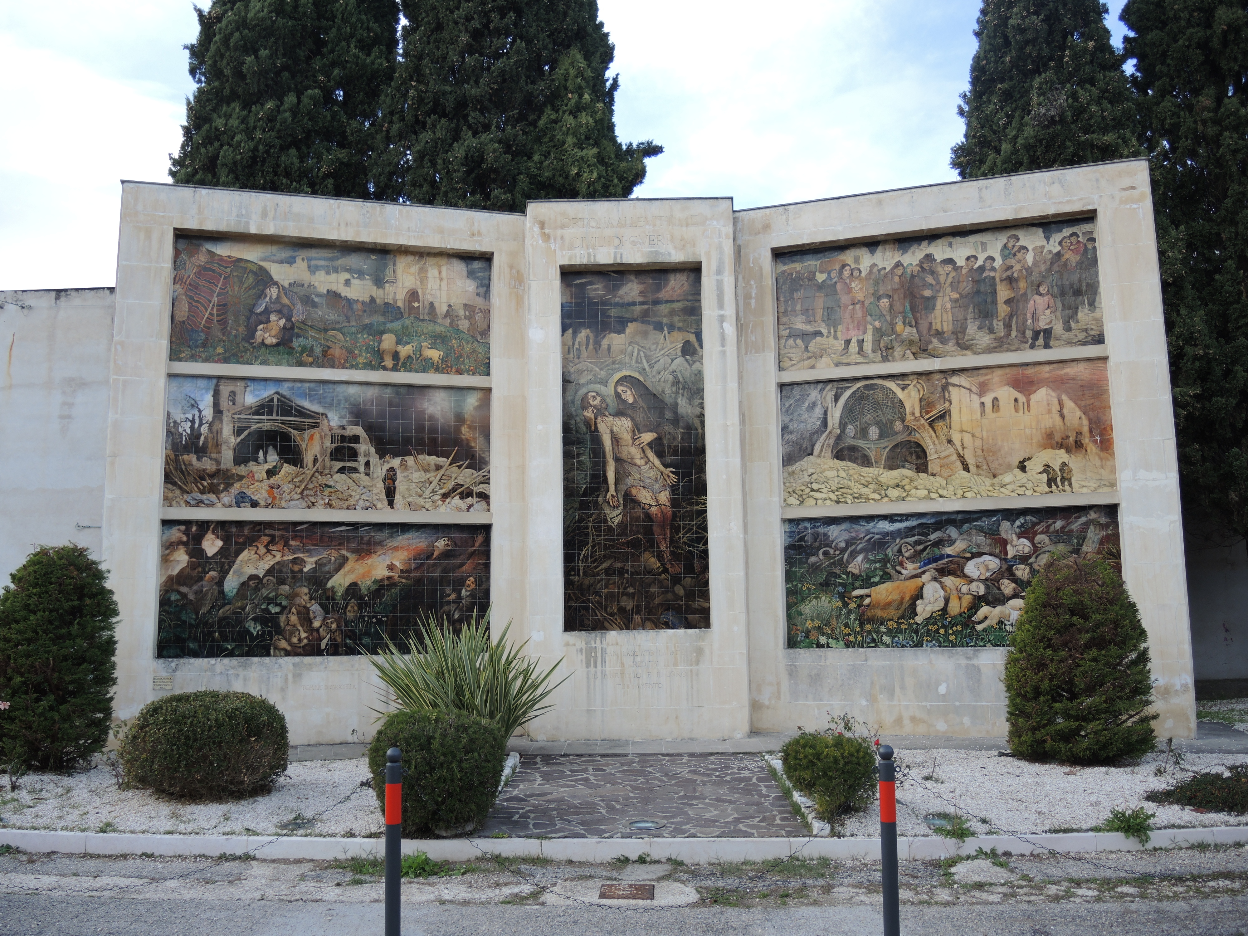 Ortona: Chiesa della Santissima Trinità